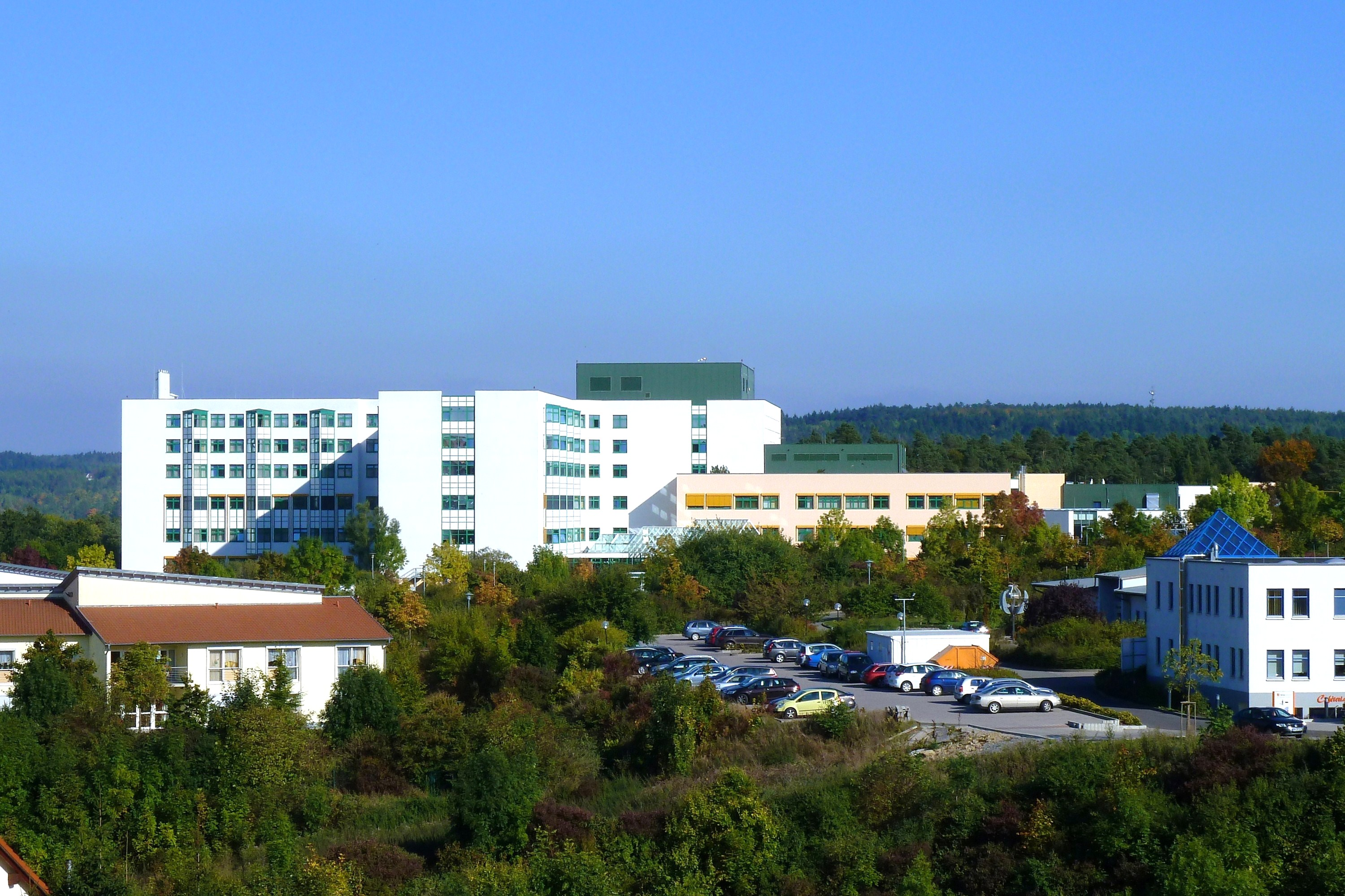 Klinikum Meiningen, flankiert von weiteren Gesundheitseinrichtungen Aufnahmezeit: September 2013 mit Lumix TZ10 Fotograf: kramer96